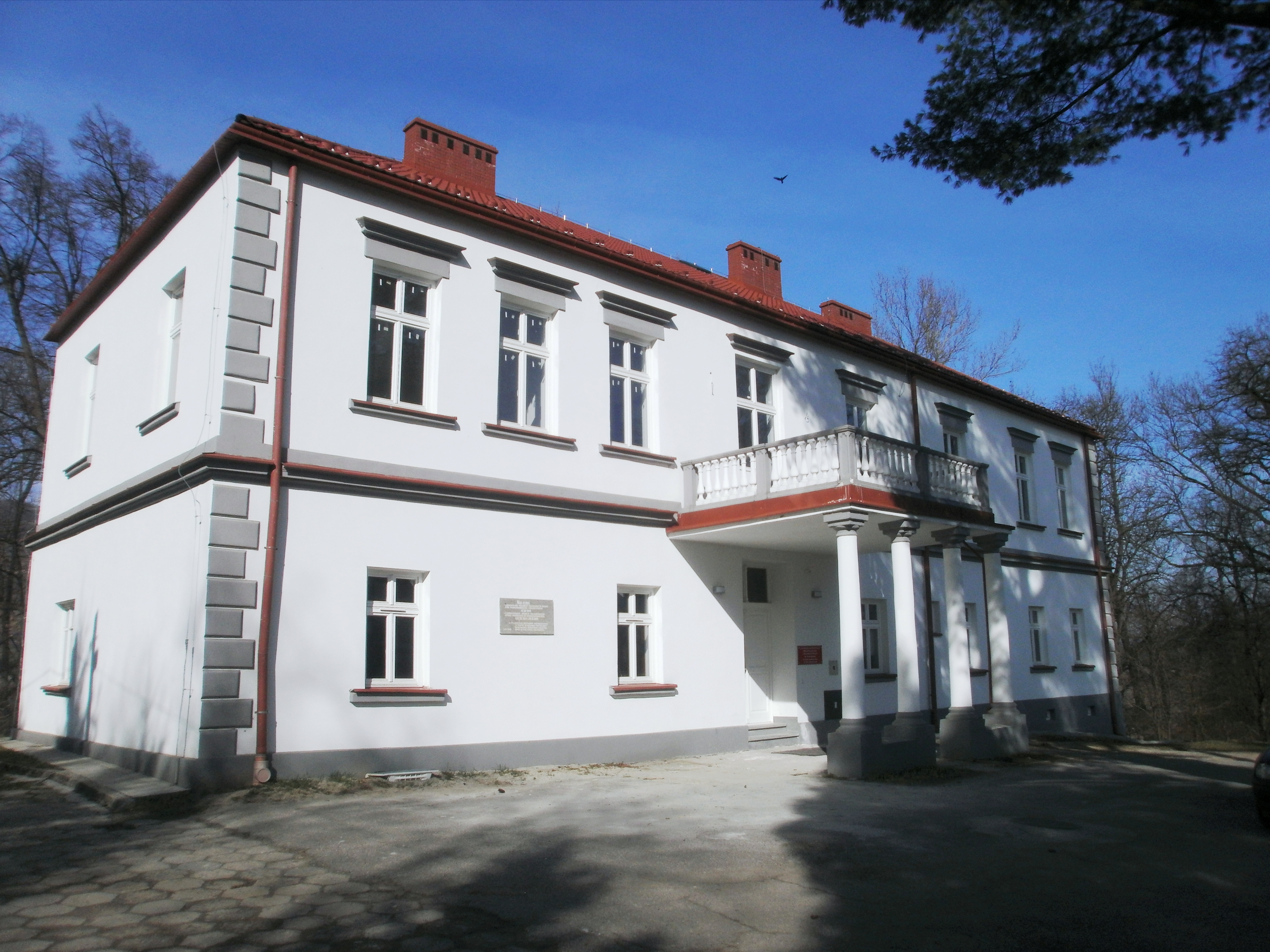 Marcinkowice, pozostałości zespołu dworskiego